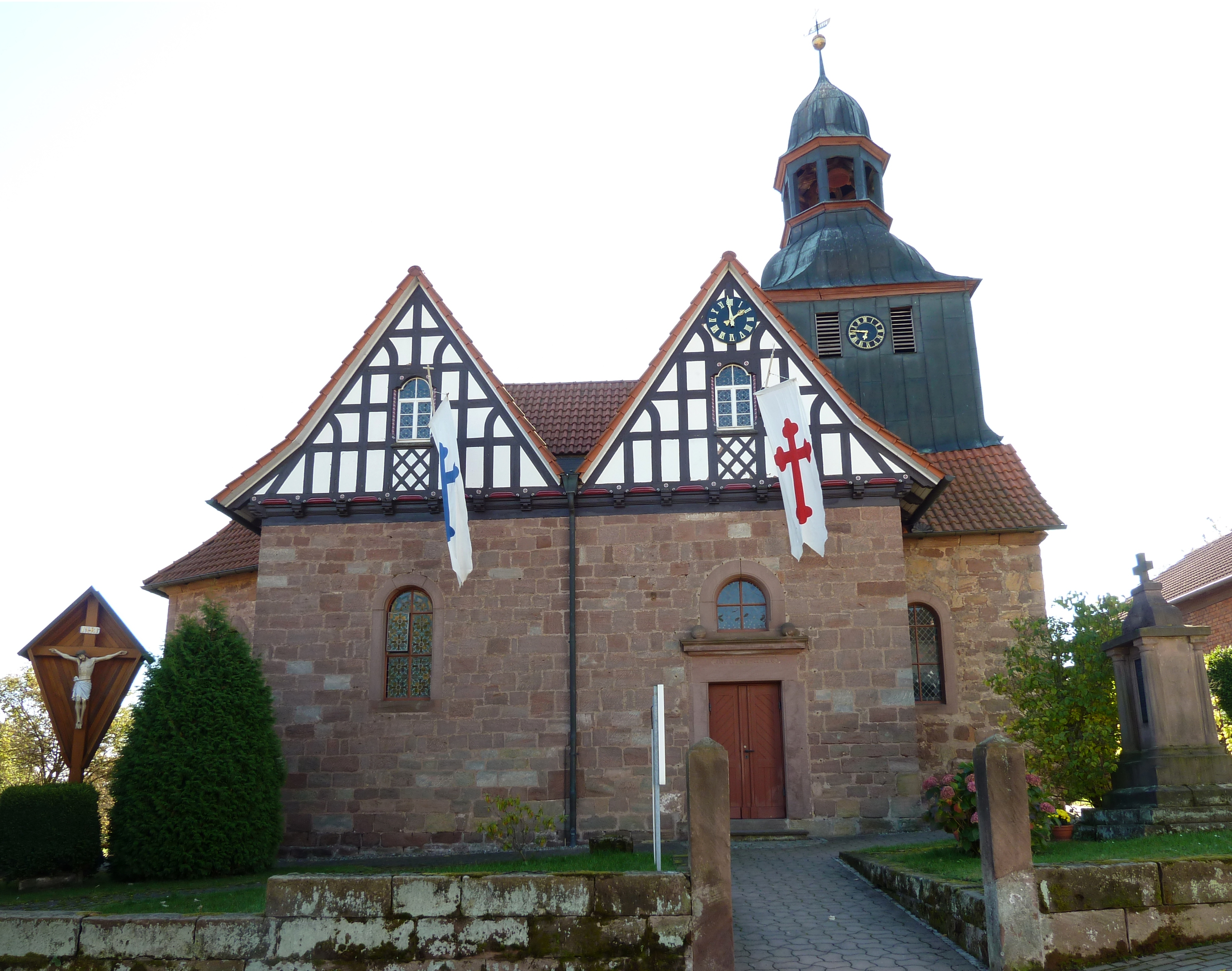 Kath. Kirche St. Pankratius in Rohrberg, Landkreis Eichsfeld. Erbaut 1730, Filialkirche von Arenshausen